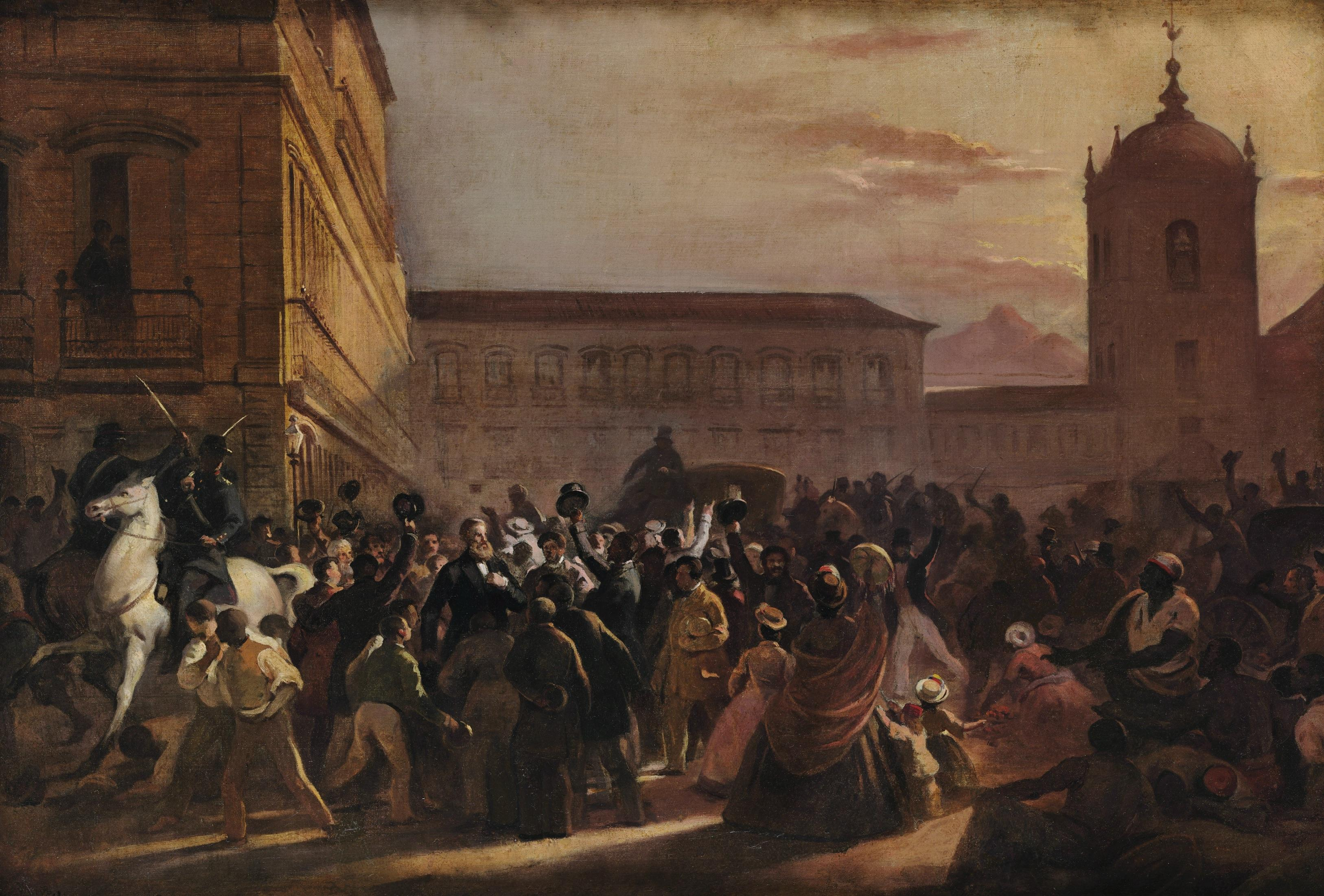 Questão Christie, a quase guerra entre Império do Brasil e Império Britânico (1861 a 1865).